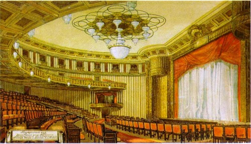 Театр оперы и балета в Минске. Интерьер зрительного зала.